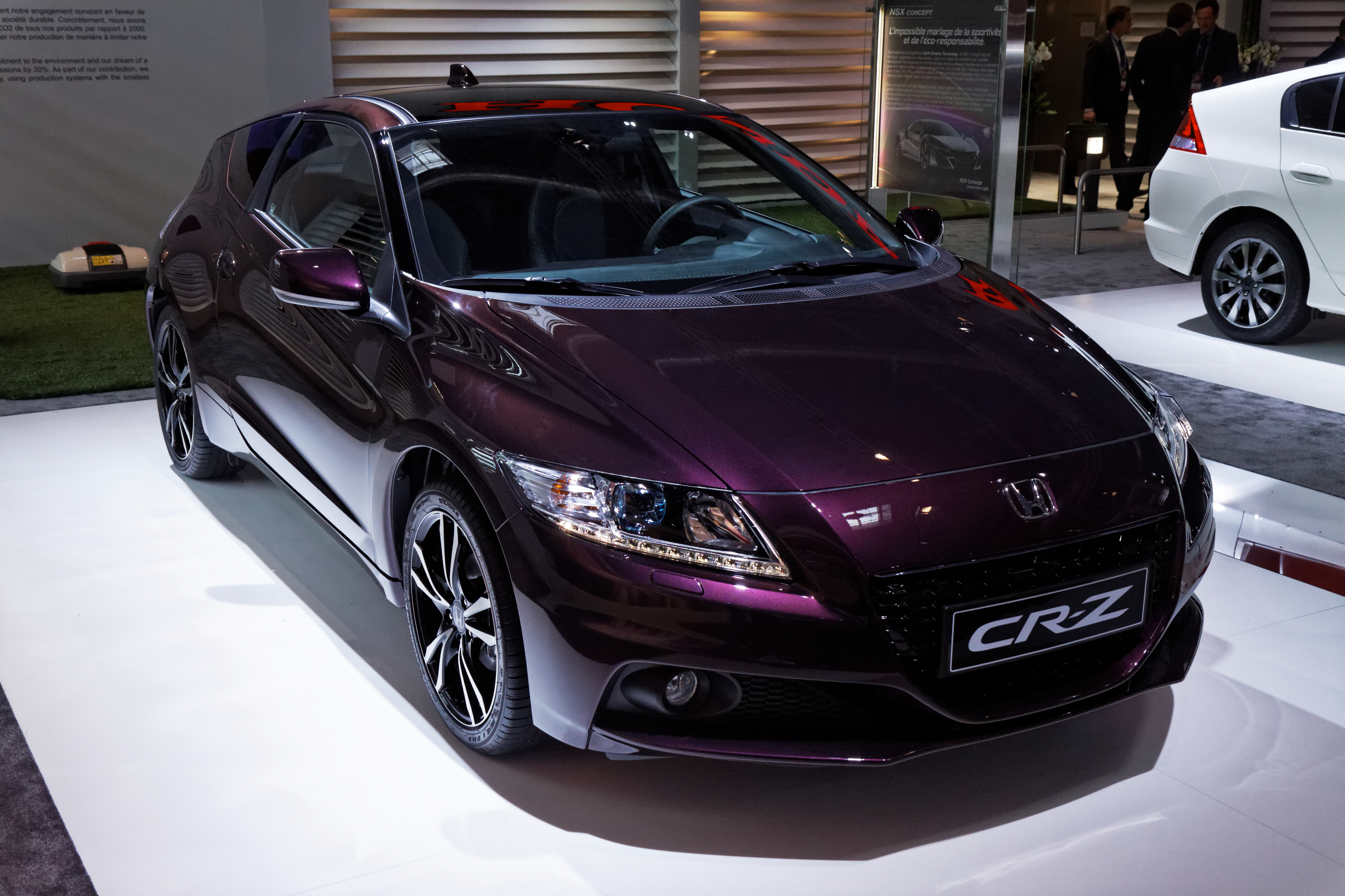 Une Honda CR-Z présentée lors du Mondial de l'automobile de Paris 2012.